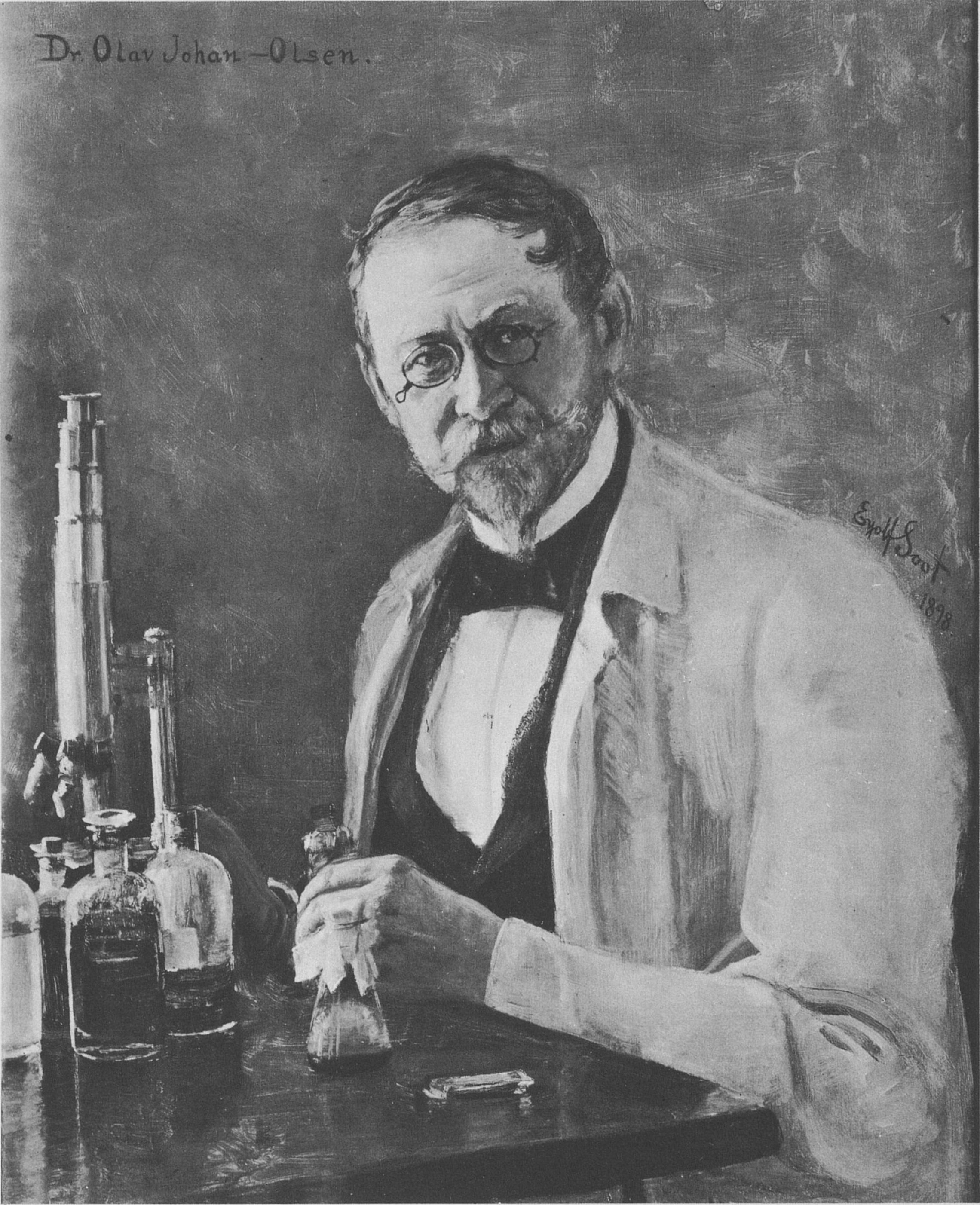 Eyolf Soot: Dr. Sopp. 1898.